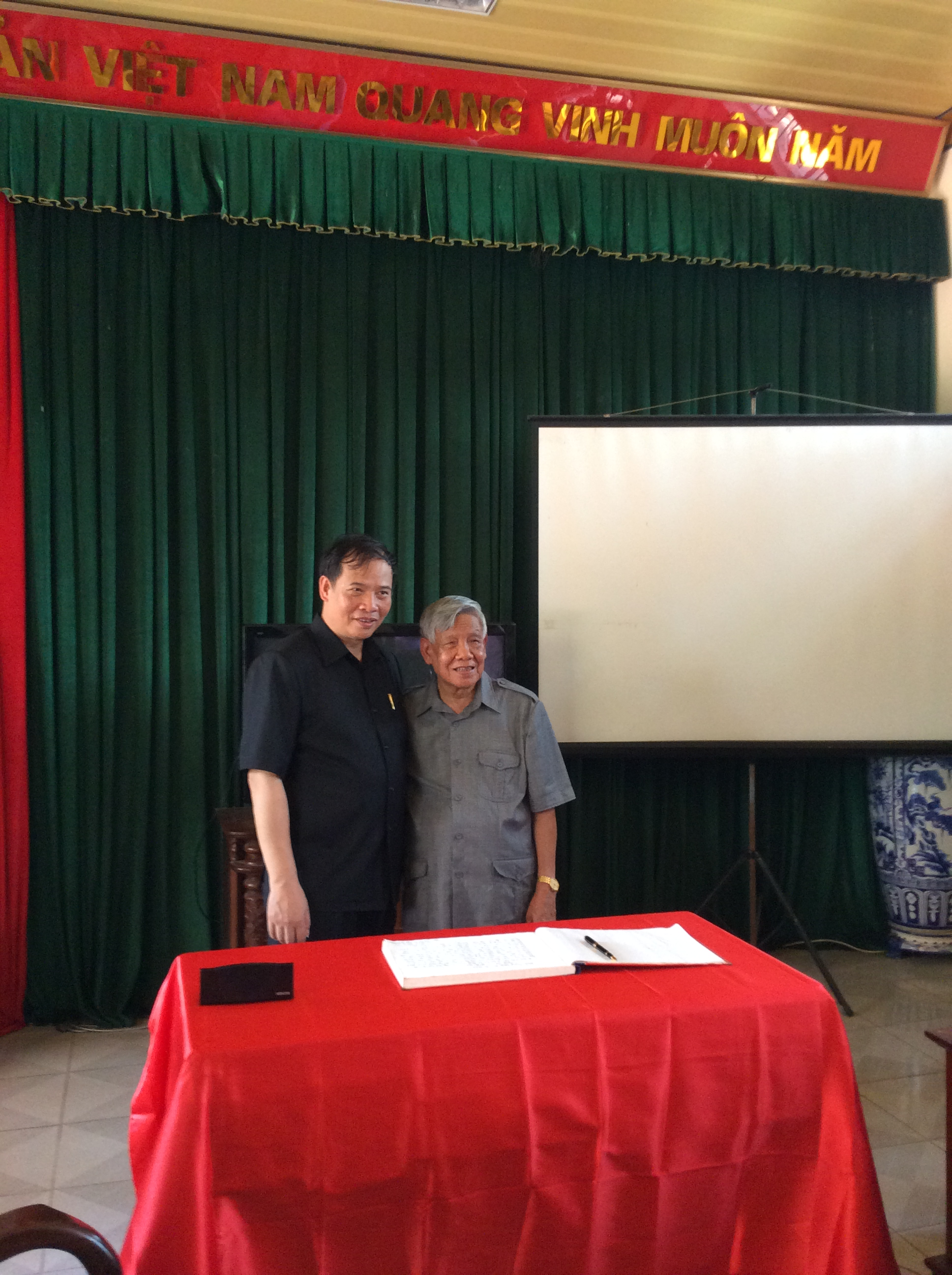 Chủ tịch UBND tỉnh Hải Dương Nguyễn Mạnh Hiển (trái) chụp hình lưu niệm cùng với Nguyên Tổng Bí thư BCHTW Đảng Cộng sản Việt Nam Lê Khả Phiêu (phải) tại khu di tích Kiếp Bạc, Hải Dương